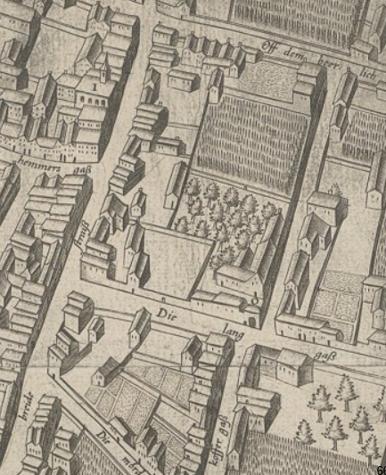 Neuenahrer Hof auf dem Berlich zwischen Breite Straße, Langgasse und Schwalbengasse, Köln